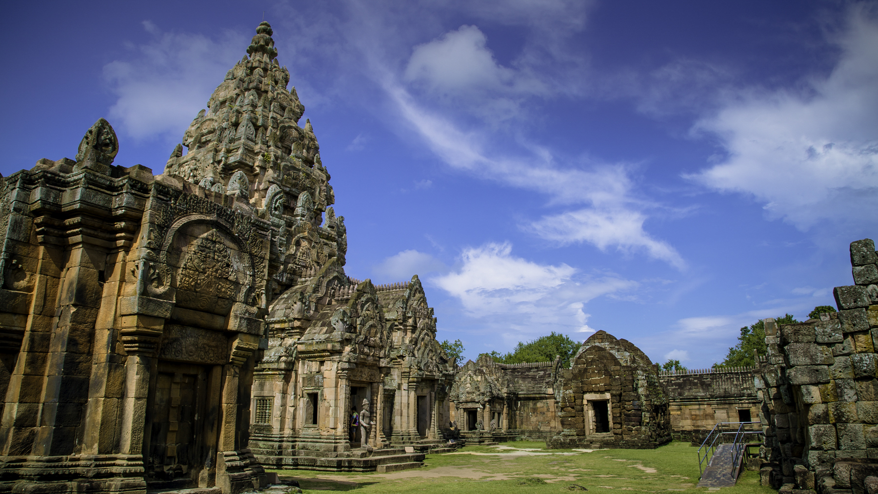 must see in Thailand ปราสาทหินพนมรุ้ง ตั้งอยู่ที่ จ.บุรีรัมย์ ภาคตะวันออกเฉียงเหนือ เป็นโบราณสถานปราสาทหินในศิลปเขมรที่มีความงดงามตั้งอยู่บนยอดเขาพนมรุ้งและมีความสำคัญมากที่สุดแห่งหนึ่งในประเทศไทย.